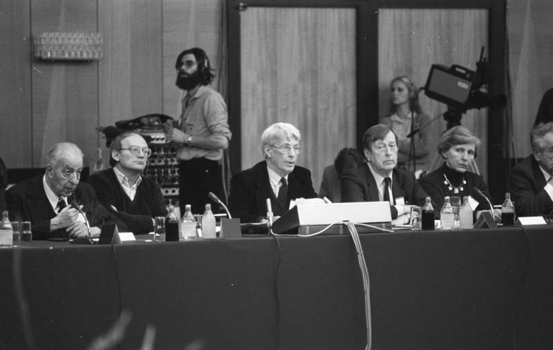 ADN-ZB/Senft/13.12.81 Berlin: Die "Berliner Begegnung zur Friedensförderung" wurde in der DDR-Hauptstadt eröffnet. An dem zweitägigen Treffen nehmen auf Einladung des DDR-Schriftstellers Stephan Hermlin rund 100 Schriftsteller, Künstler und Wissenschaftler aus beiden deutschen Staaten sowie aus weiteren europäischen Ländern und aus Westberlin teil. Unter ihnen sind Prof. Jürgen Kuczynski, Hermann Kant, Stephan Hermlin, Bernt Engelmann (BRD) und Ingeborg Drewitz (Westberlin).-v.l.n.r.